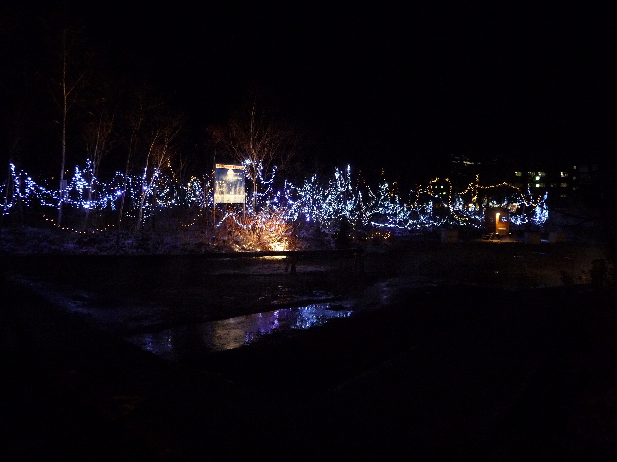 北海道弟子屈町川湯温泉で行われているイベント、ダイヤモンドダストin川湯のイルミネーション。